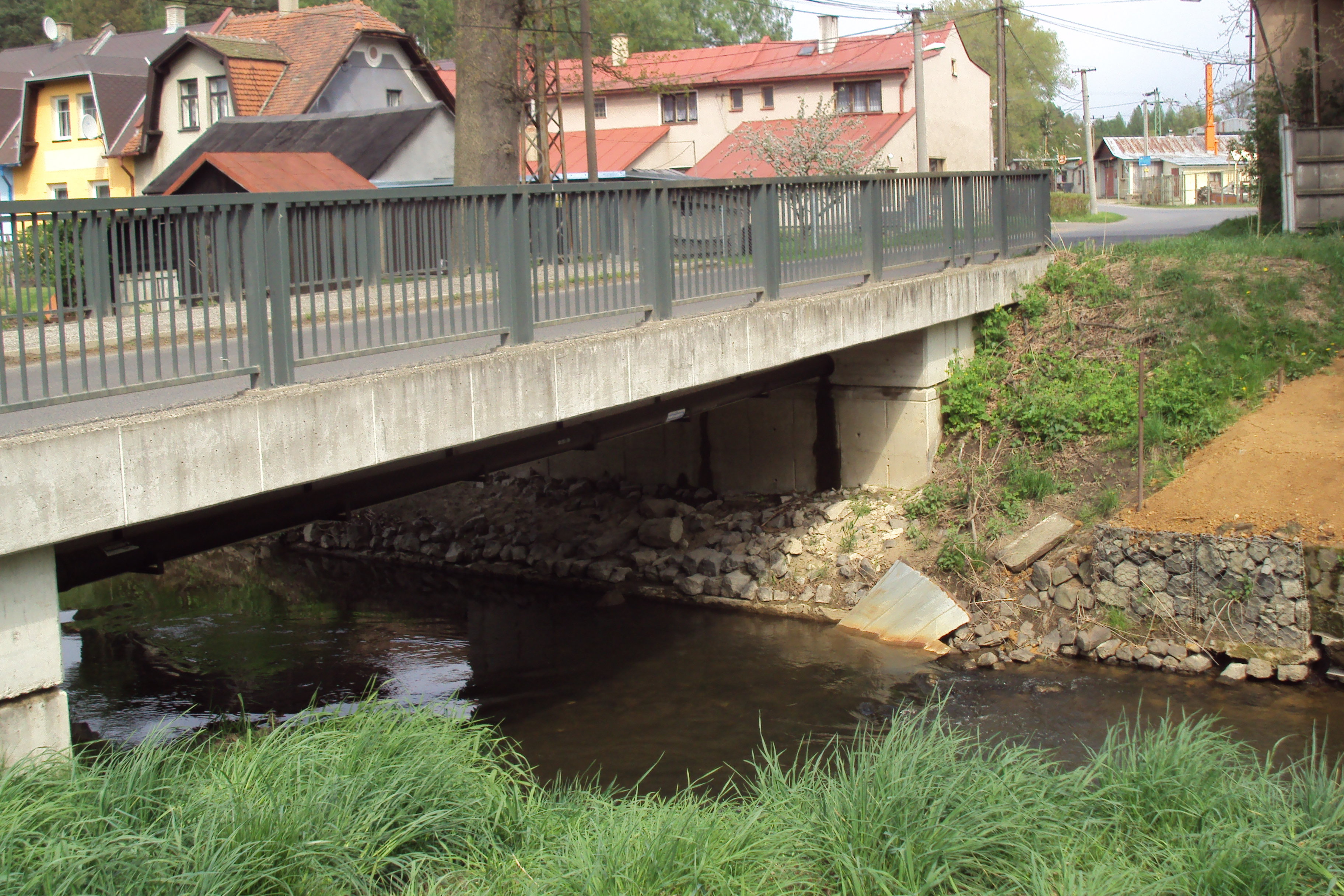 Most přes Panenský potok ve Velkém Grunově u Brniště